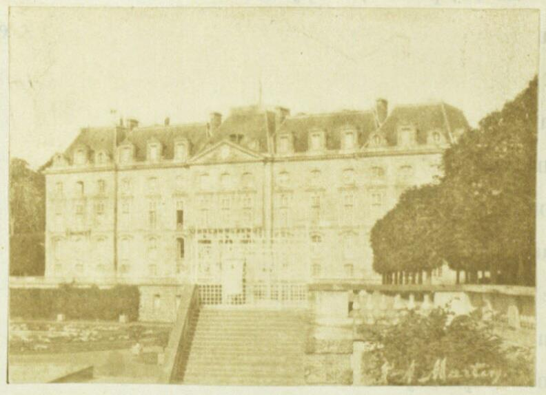 Photographie du château-neuf de Meudon en 1850, prise par Louis-Auguste Martin (1811-1875). Albertina Museum, FotoGLV2000/13822/7